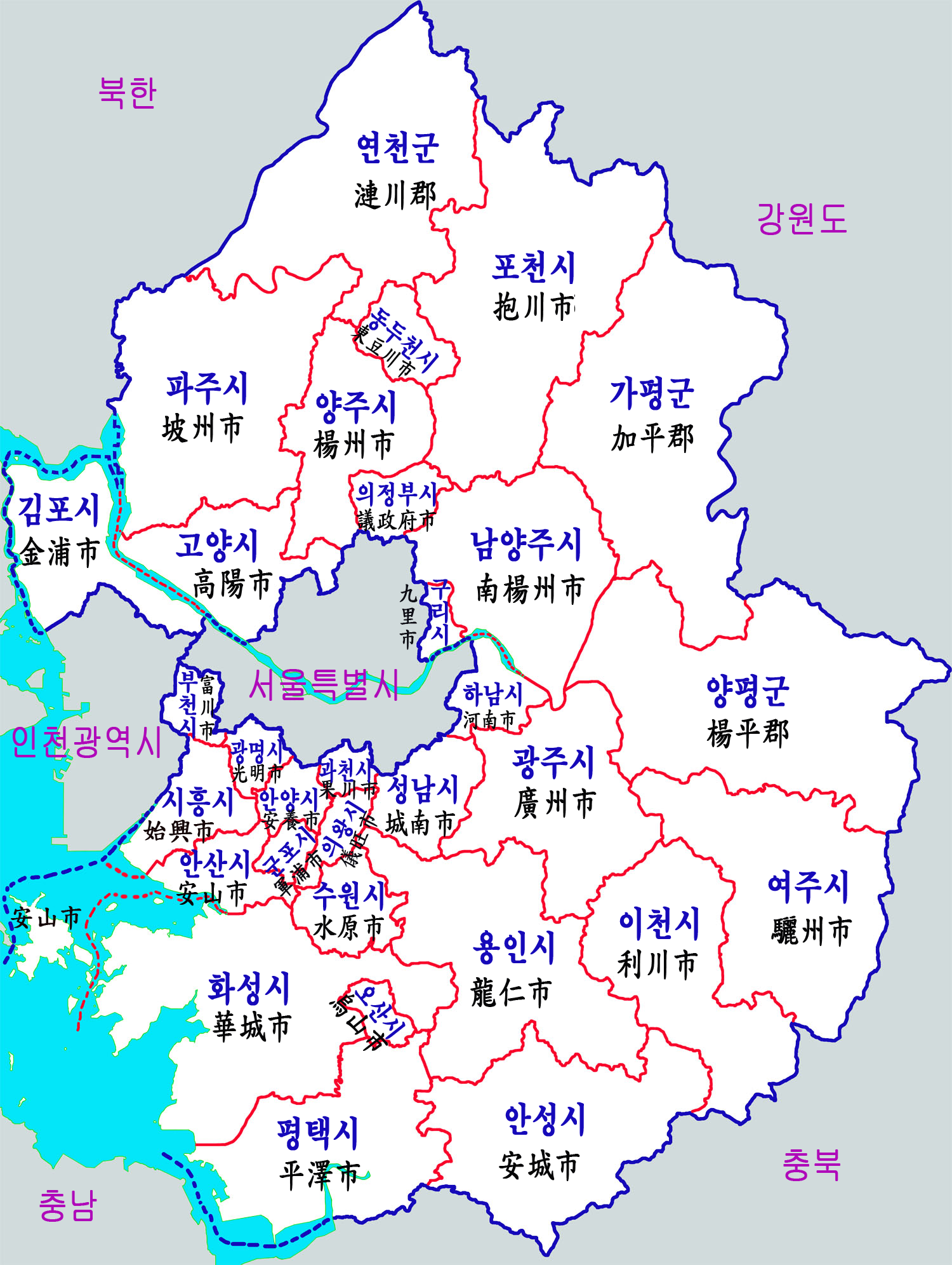 경기도 행정구역도